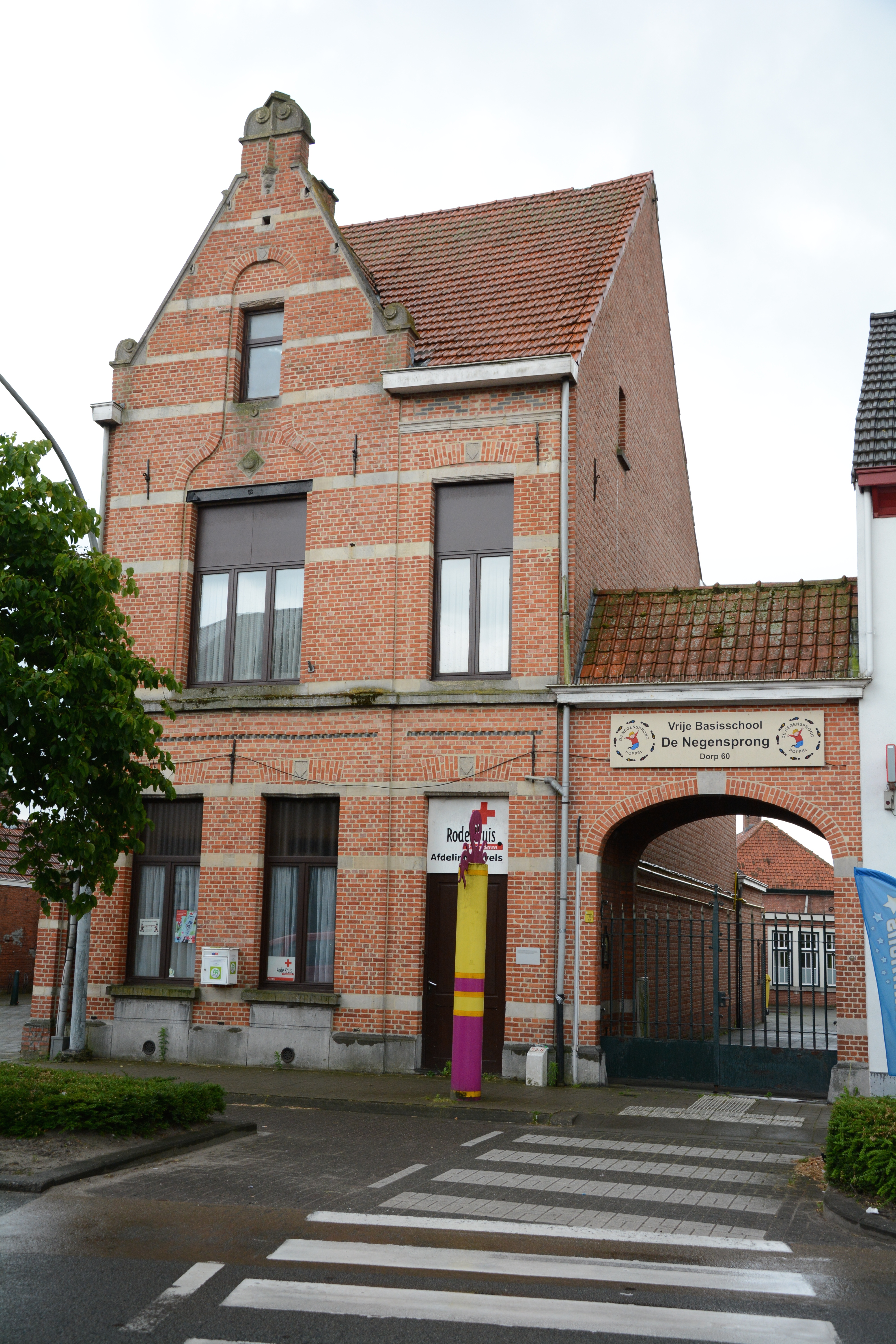 Gesubsidieerde vrije basisschool, Dorp 60, Poppel